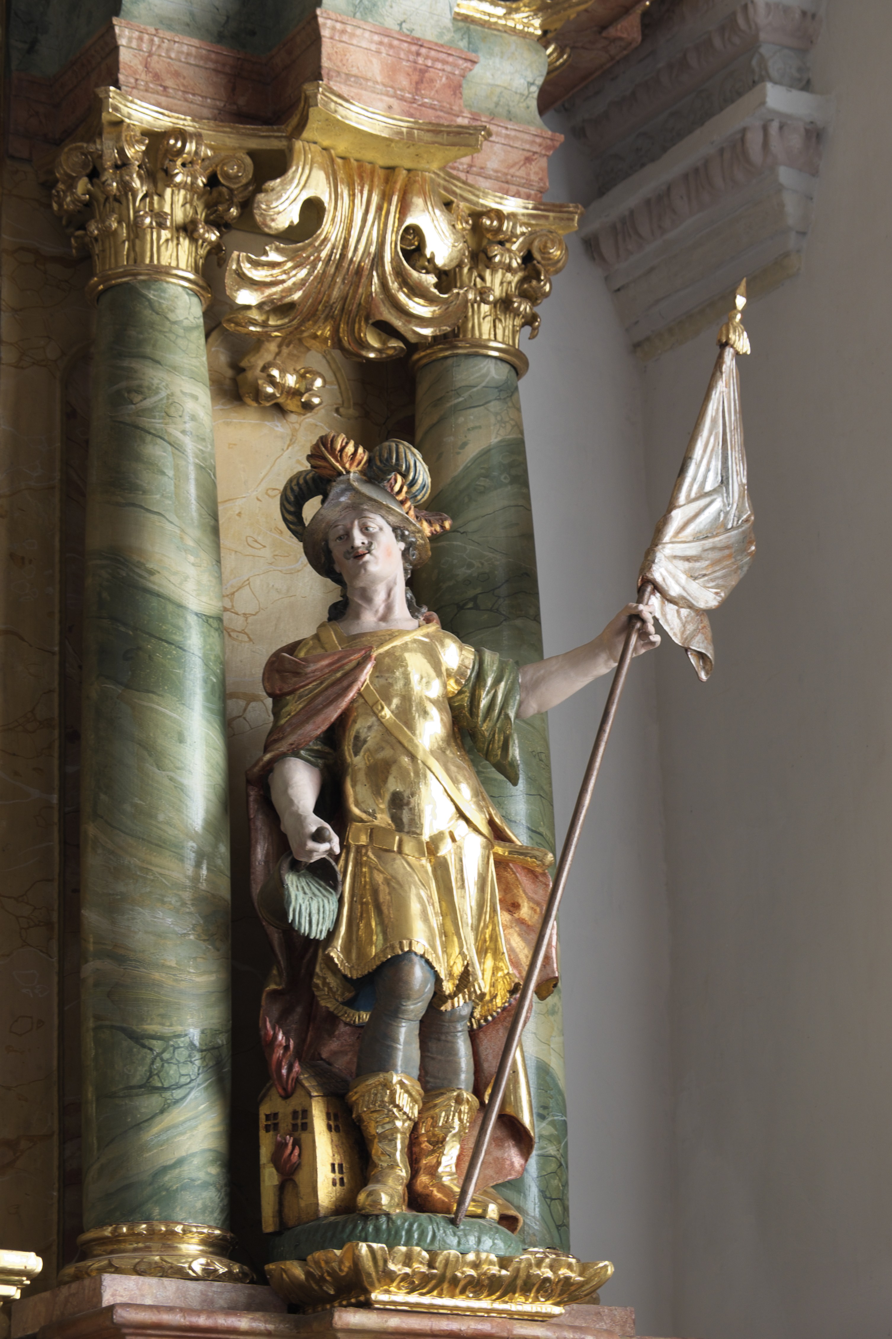 Katholische Pfarrkirche St. Michael in Rottbach (Maisach) im Landkreis Fürstenfeldbruck (Bayern/Deutschland), Hochaltar von 1699, Skulptur des heiligen Florian